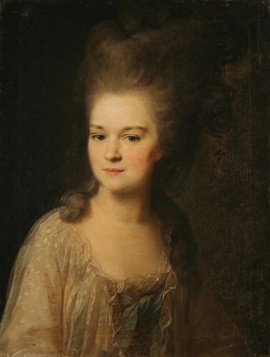 Графиня Анна Петровна Кутайсова (1760-1848), дочь Петра Терентьевича Резвого (1729-1779) и Анны Дмитриевны Куиной (1734-1801), с 1779 года была замужем за графом И.П. Кутайсовым.